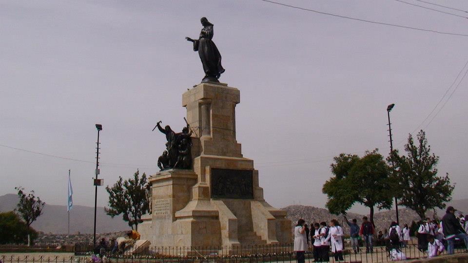 MONUMENTO A LAS HEROÍNAS DE LA CORONILLA Declarado Monumento Nacional el 14 de octubre de 1926; esta asentado sobre la Colina de San Sebastián, ubicada al sud de Cochabamba. El monumento hecho en bronce, tiene un alto de 6,00 mts. y ancho de 2,00 mts. erigido en homenaje a las Heroínas de la Coronilla y al movimiento independentista del 27 de mayo de 1812. En mayo de dicho año, Goyeneche estaba al frente de las tropas realistas y una vez que derrotó a las tropas patriotas que estaban al mando de Esteban Arce avanzo hacia Cochabamba que preparaba la resistencia con muy escasos recursos. Los pocos habitantes del lugar en su mayoría mujeres salieron a enfrentar la invasión española a la cabeza de doña Mañuela Gandarillas que, aun estando ciega, comando valerosamente el regimentó civil femenino. Se atrincheraron en la colina de San Sebastián. Finalmente Goyeneche entró a Cochabamba el 27 de mayo de 1812, quebrando la heroica resistencia. Para que las personas nunca olvidaran el valor que tuvieron aquellas mujeres cochabambinas, este lugar recibió el nombre de “Coronilla”. En el inicio de la colina hay dos leones de metal antiguamente estos fueron dos cañones de guerra. En el monumento se representa a tres mujeres, 2 niños, un anciano y al centro la figura de Manuela Gandarillas quien liderizó la batalla. En la parte superior del monumento se encuentra una estatua de Cristo. Parte de la identidad de Cochabamba.